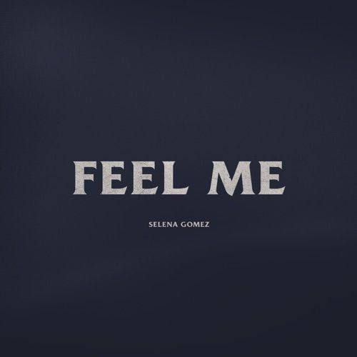 Carátula del sencillo Feel Me de Selena Gomez